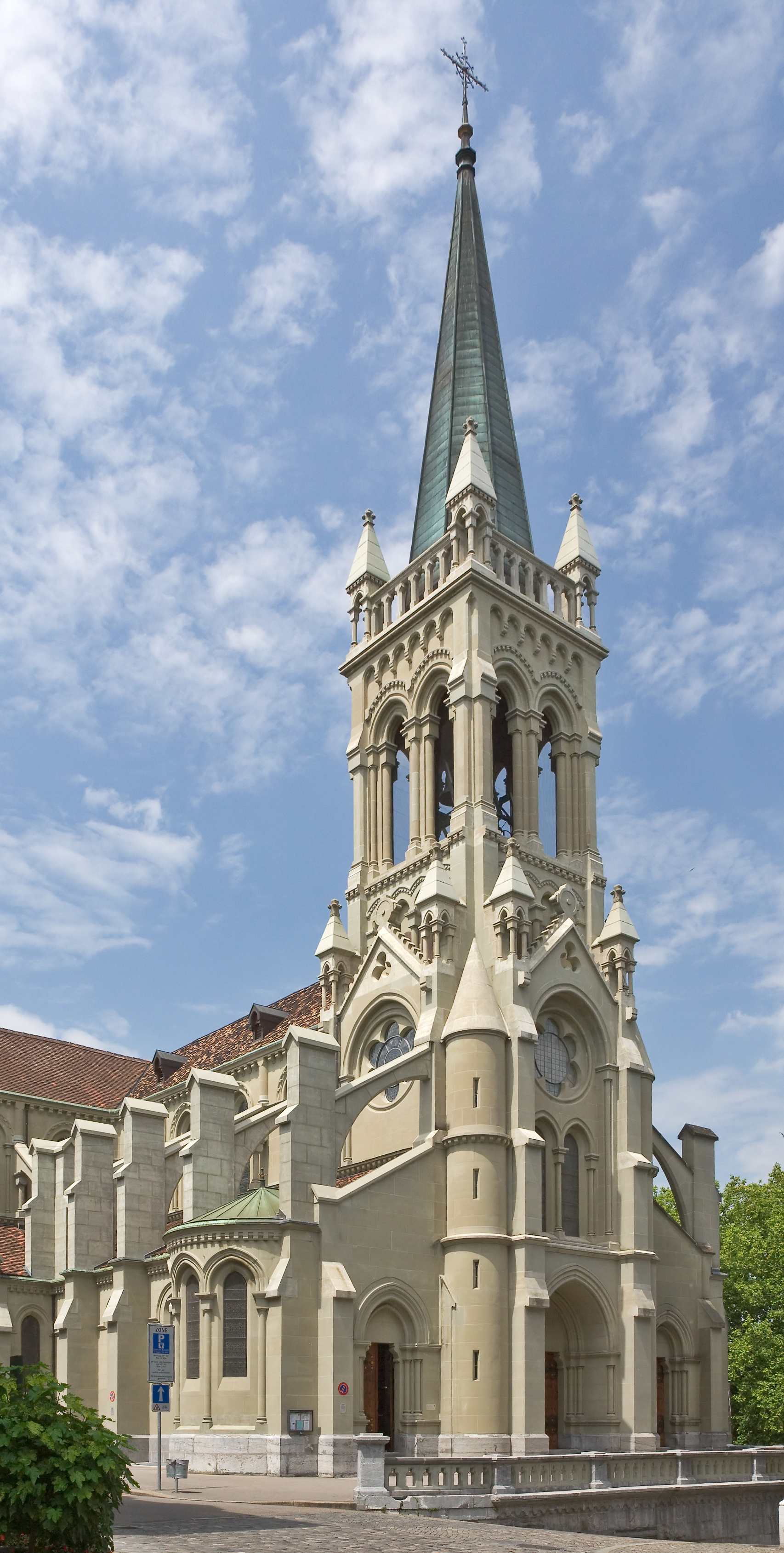 Kirche St. Peter und Paul